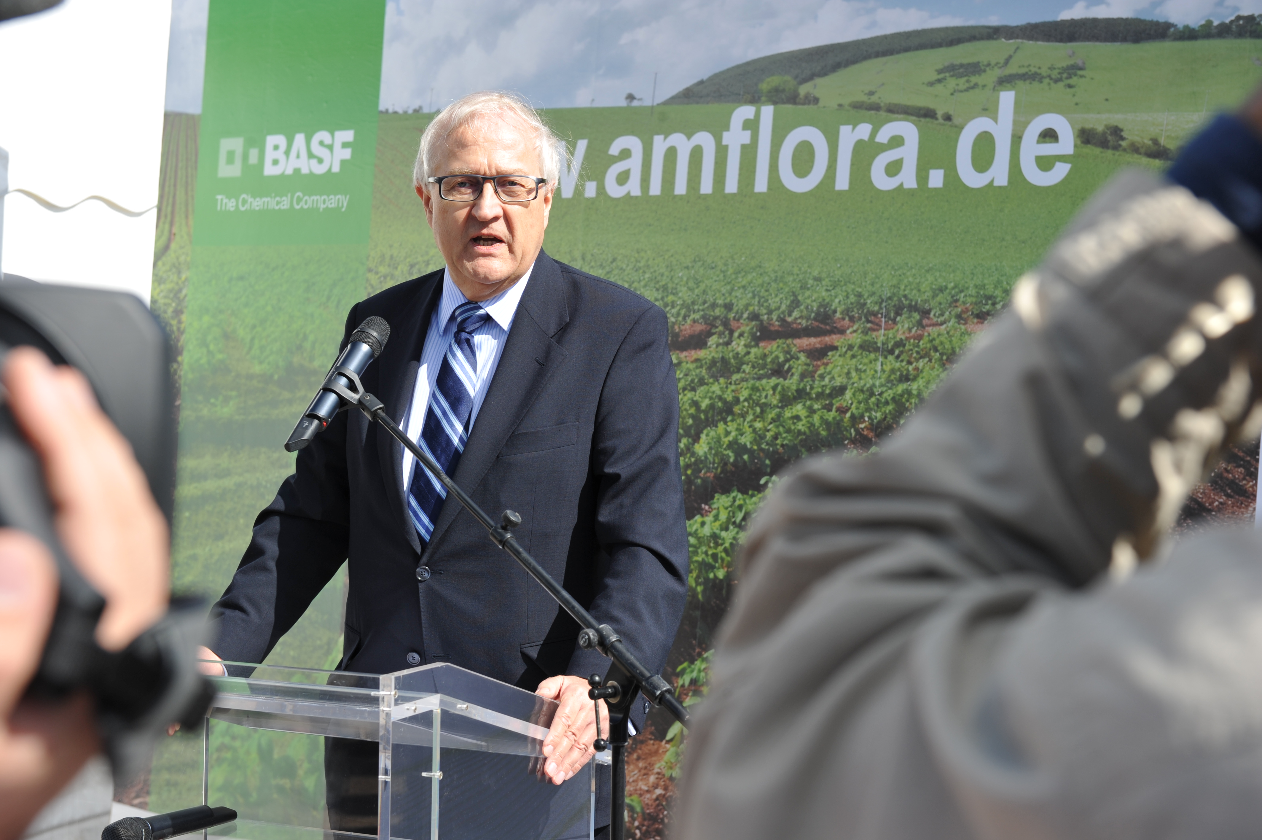 Der Bundesminister für Wirtschaft und Technologie Rainer Brüderle startete Ende August die Amflora-Ernte in Zepkow, Mecklenburg-Vorpommern - zusammen mit dem BASF-Vorstandsvorsitzenden Dr. Jürgen Hambrecht.